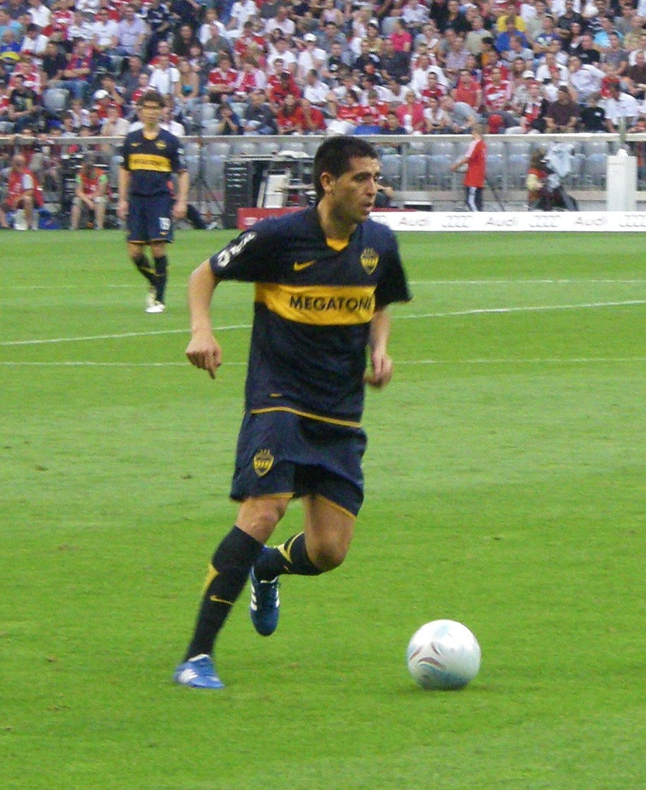 argentinischer Fußballspieler, Boca Juniors